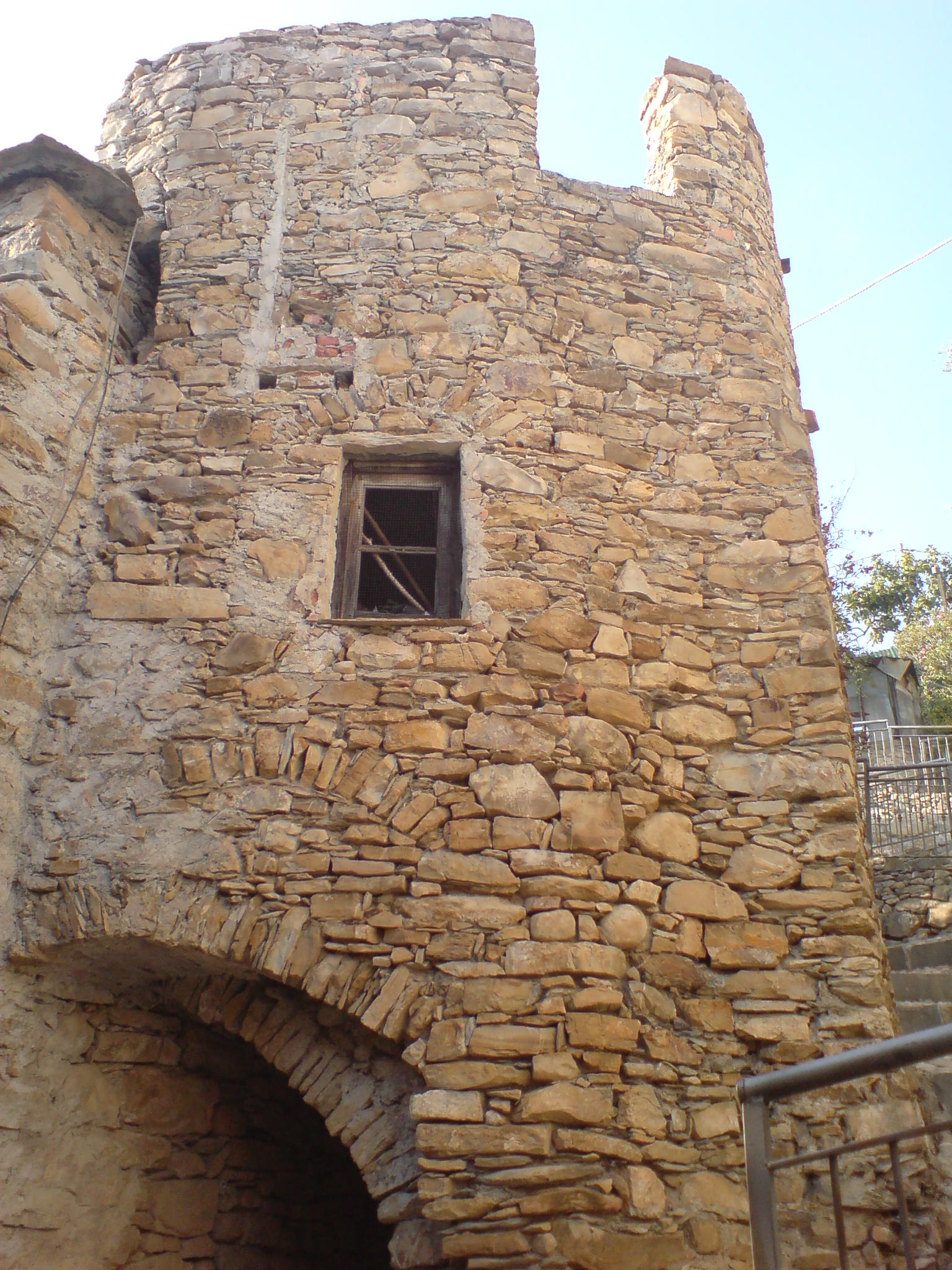 Casa fortificata a Pompeiana(IM), risalente all'epoca delle incursioni dei pirati barbareschi